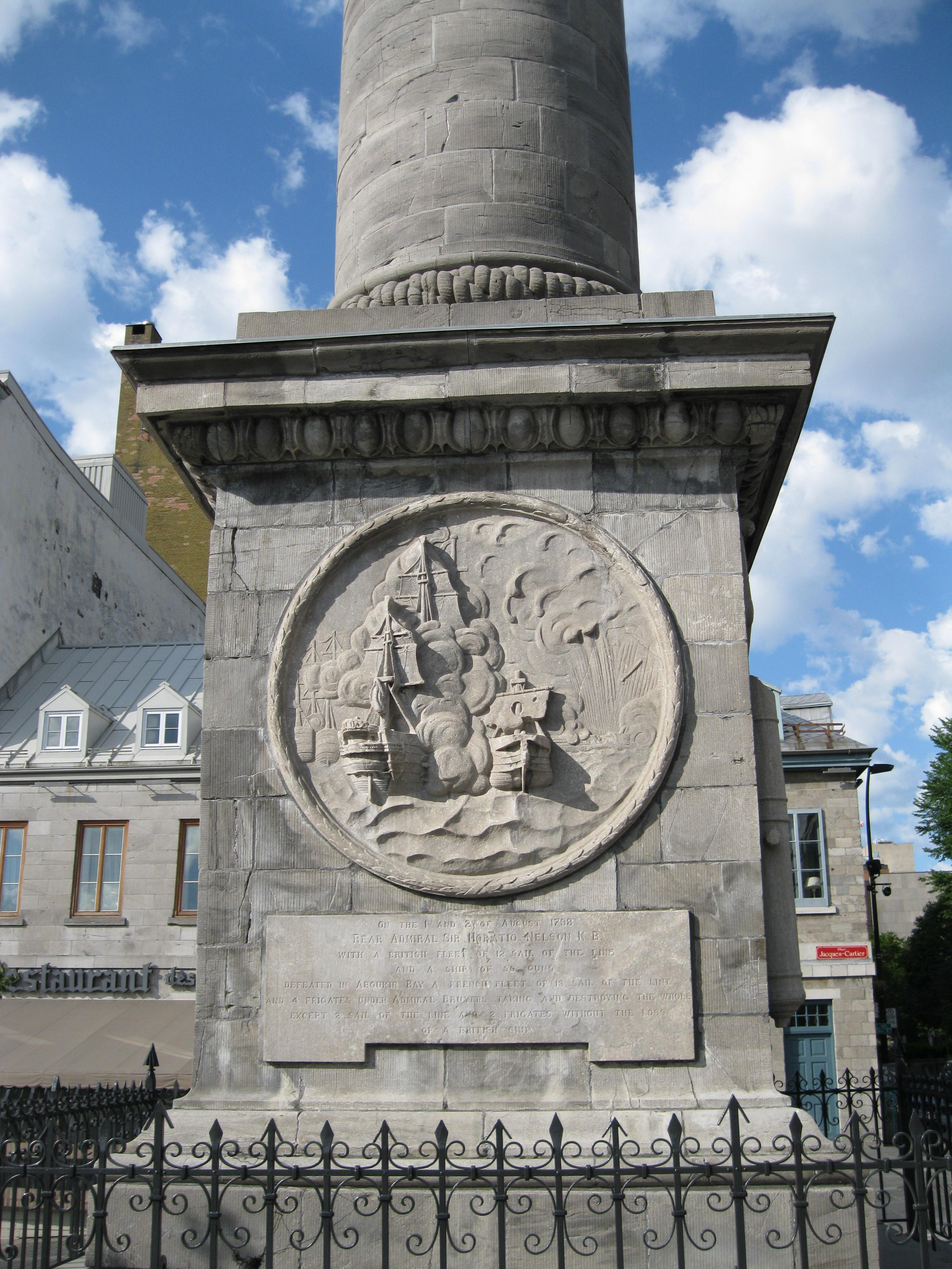 Colonne Nelson, place Jacques-Cartier, Montréal